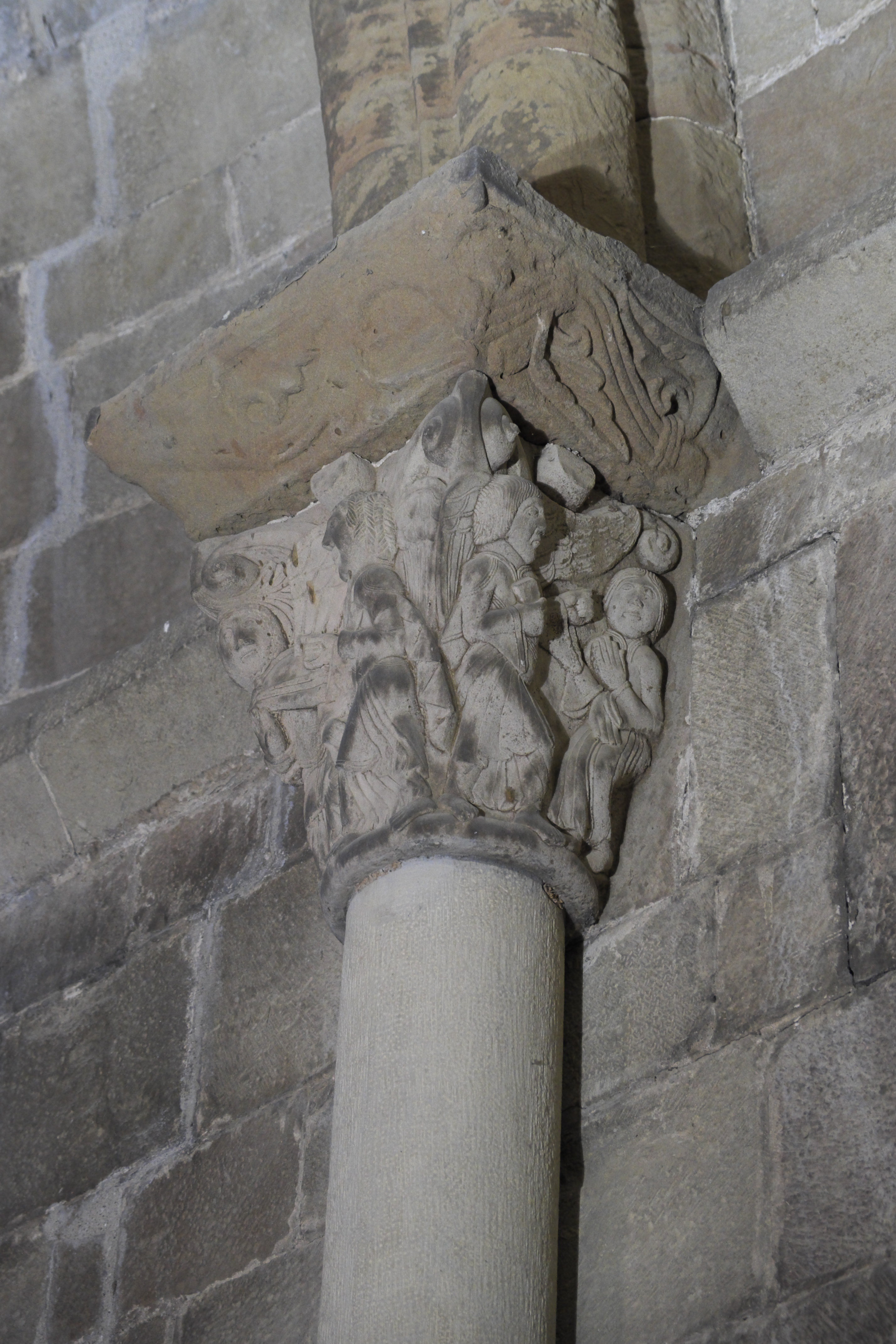 Pfarrkirche und ehemalige Klosterkirche Santa María in Santa Cruz de la Serós in der Provinz Huesca (Aragón/Spanien), Kapitell der sogenannten geheimen Kammer über dem Gewölbe der Vierung, Darstellung: Verkündigung